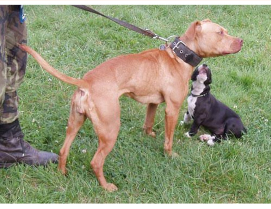 Apbt standard